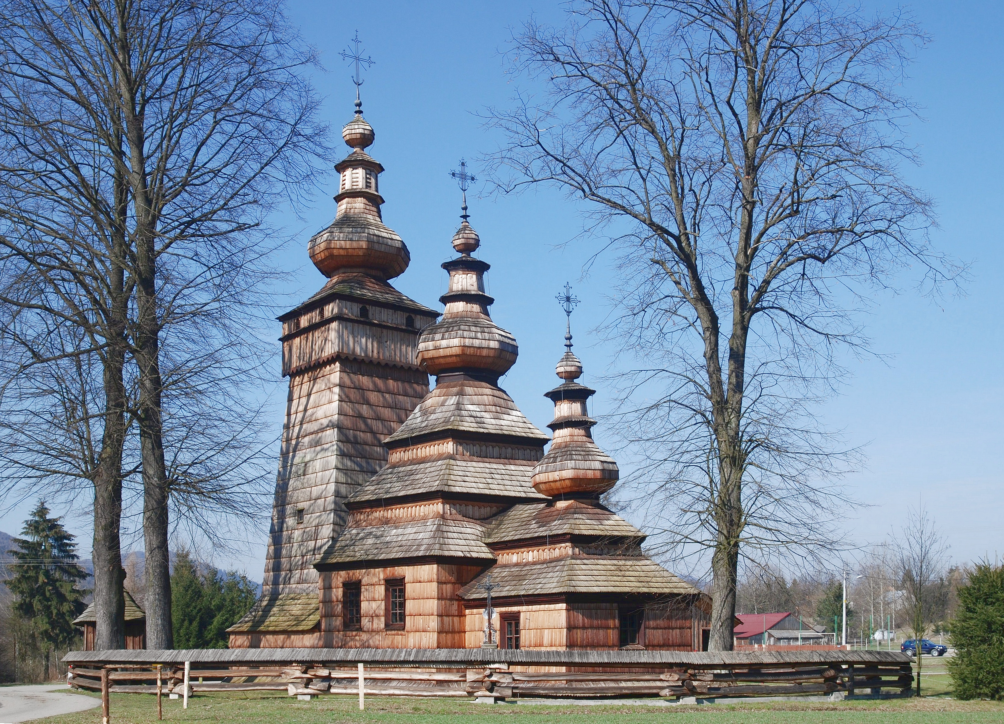 wieś Kwiatoń